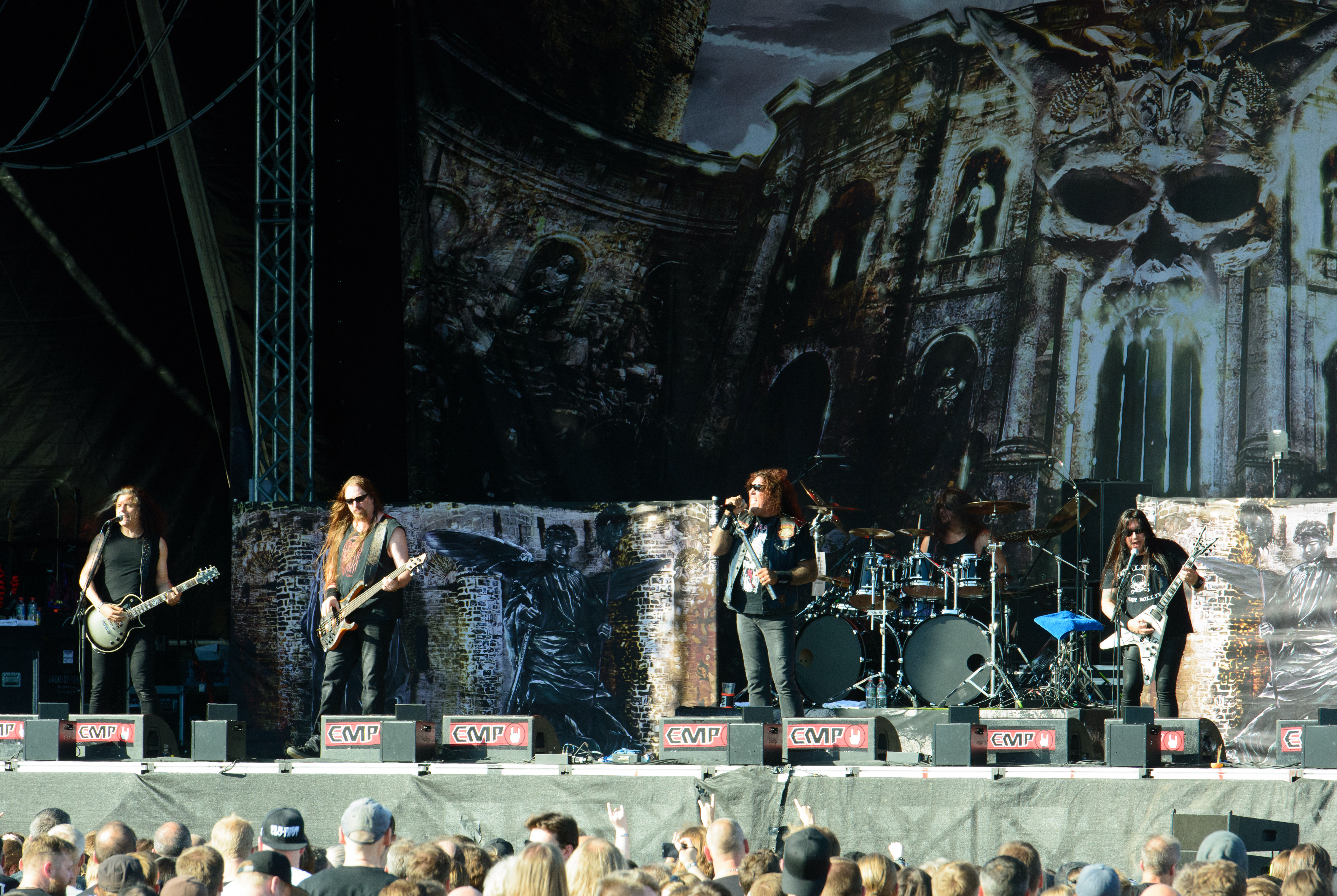 Testamemt beim Elbriot 2016